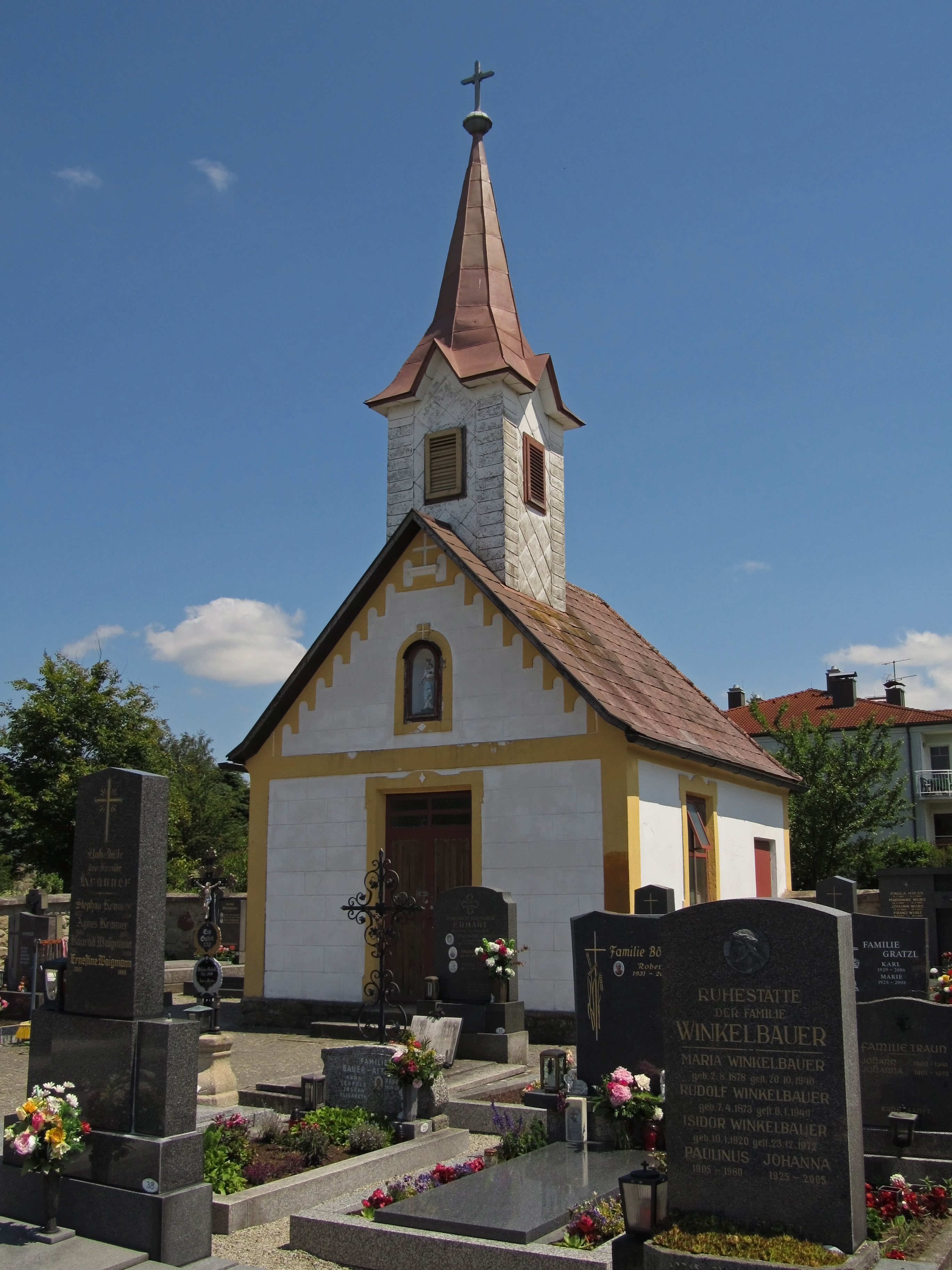 Friedhofskapelle in Eggern